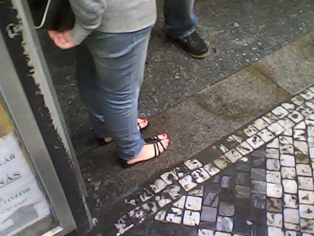 žensko stopalo u Pragu